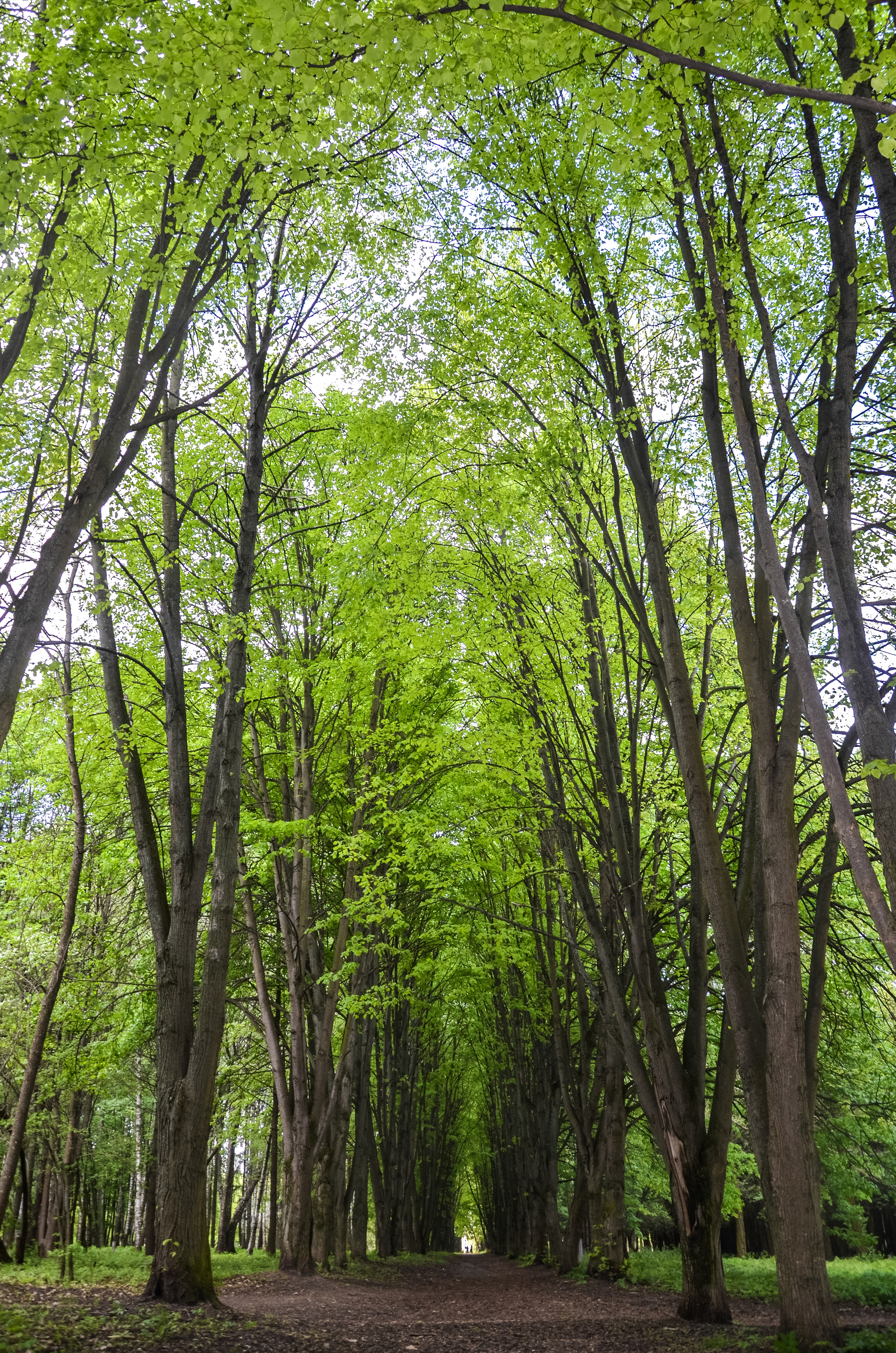 Дендропарк "Поділля" у місті Хмельницькому. На його території зростають сотні дерев та кущів.